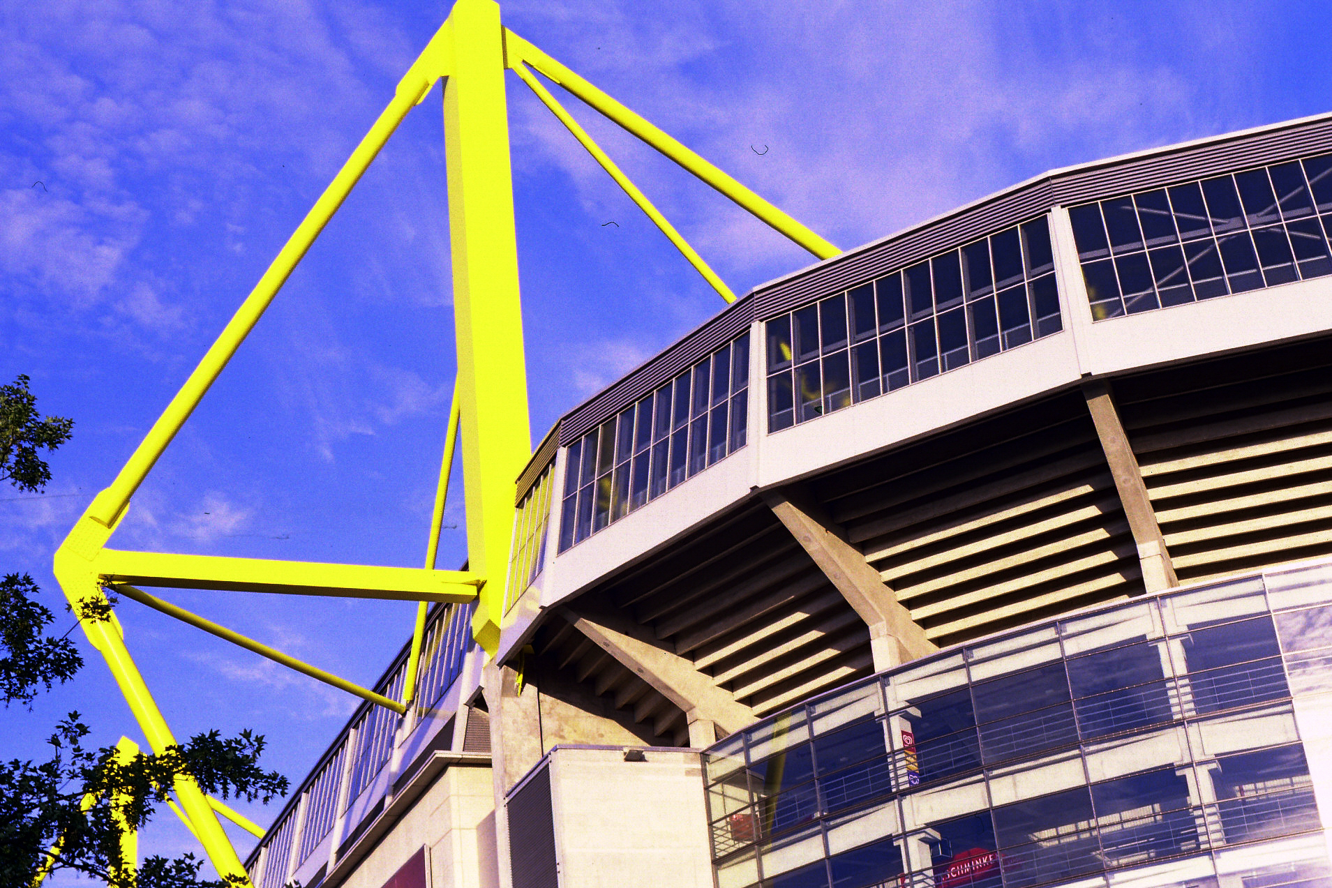 Westfalenstadion Dortmund Ecke Nordwest